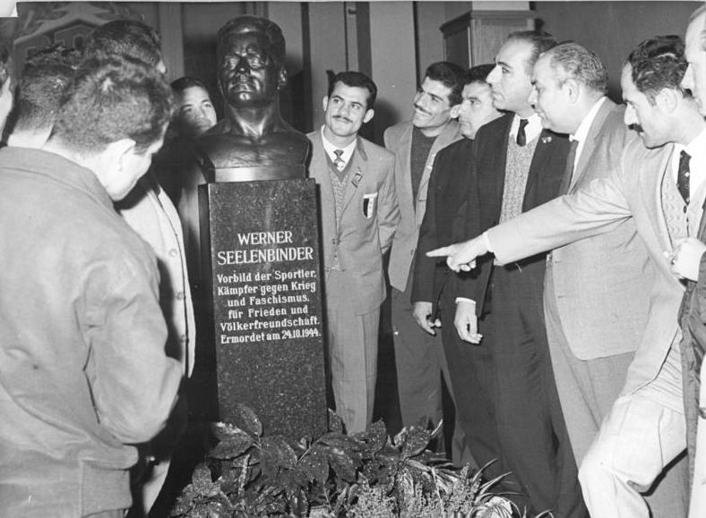 Berlin, Boxer aus Syrien, Gedenkstelle Zentralbild Kohls 4.10.1963 Syrische Boxdelegation in Berlin In ihrem 49. Länderkampf treffen die DDR-Boxer am 5.10.1963 in der Berliner Dynamo-Sporthalle auf die Staffel Syrien. Der zweite Vergleich findet zwei Tage später in Schwerin statt. Die Boxdelegation, die bereits einige Tage vor Beginn des Länderkampfes in Berlin eingetroffen war, unternahm am 4.10.1963 einen ausgedehnten Stadtbummel durch die Hauptstadt unserer Republik. UBz: Die Boxdelegation besuchte auch die Werner-Seelenbinder-Halle und längere Zeit verweilte sie an der Büste des unvergessenen Arbeitersportlers.